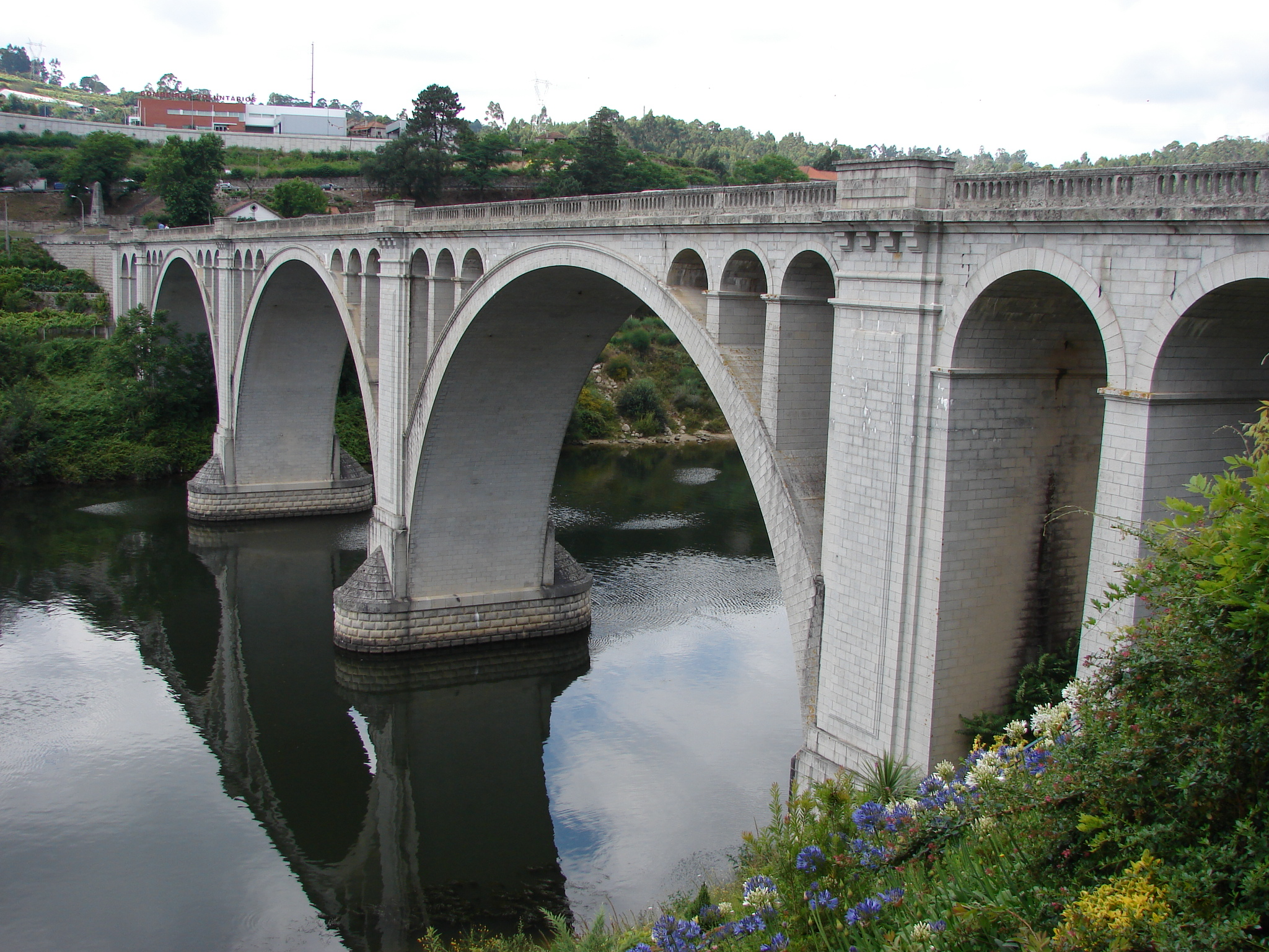 Ponte de Pedra, situada em Entre-os-Rios. Foz do rio Tâmega.